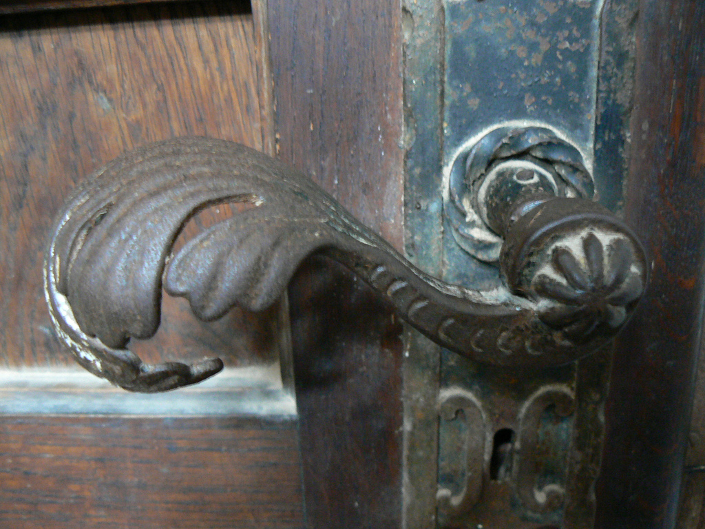 Címeres templomkilincs, szegedi Fogadalmi templom. Készült: 1909